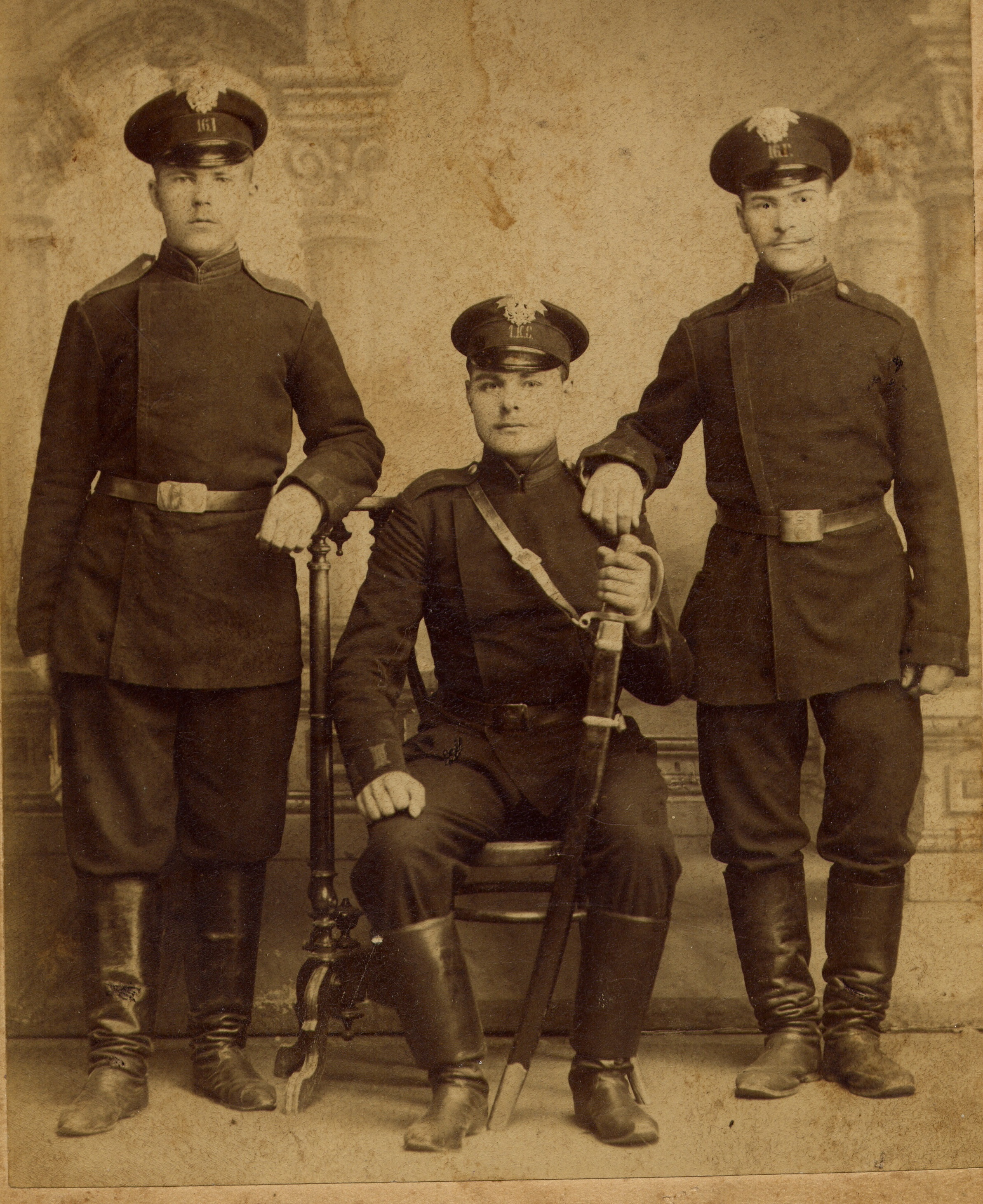 Слева направо: рядовой 16-го гренадерского Мингрельского Его Императорского Высочества Великого Князя Дмитрия Константиновича полка Алексей Семёнович Усачёв, рядовой 1-го Кавказского саперного батальона Михаил Бочкарёв, рядовой 16-го гренадерского полка Михаил Борисов (Тифлис, 1903 г.)